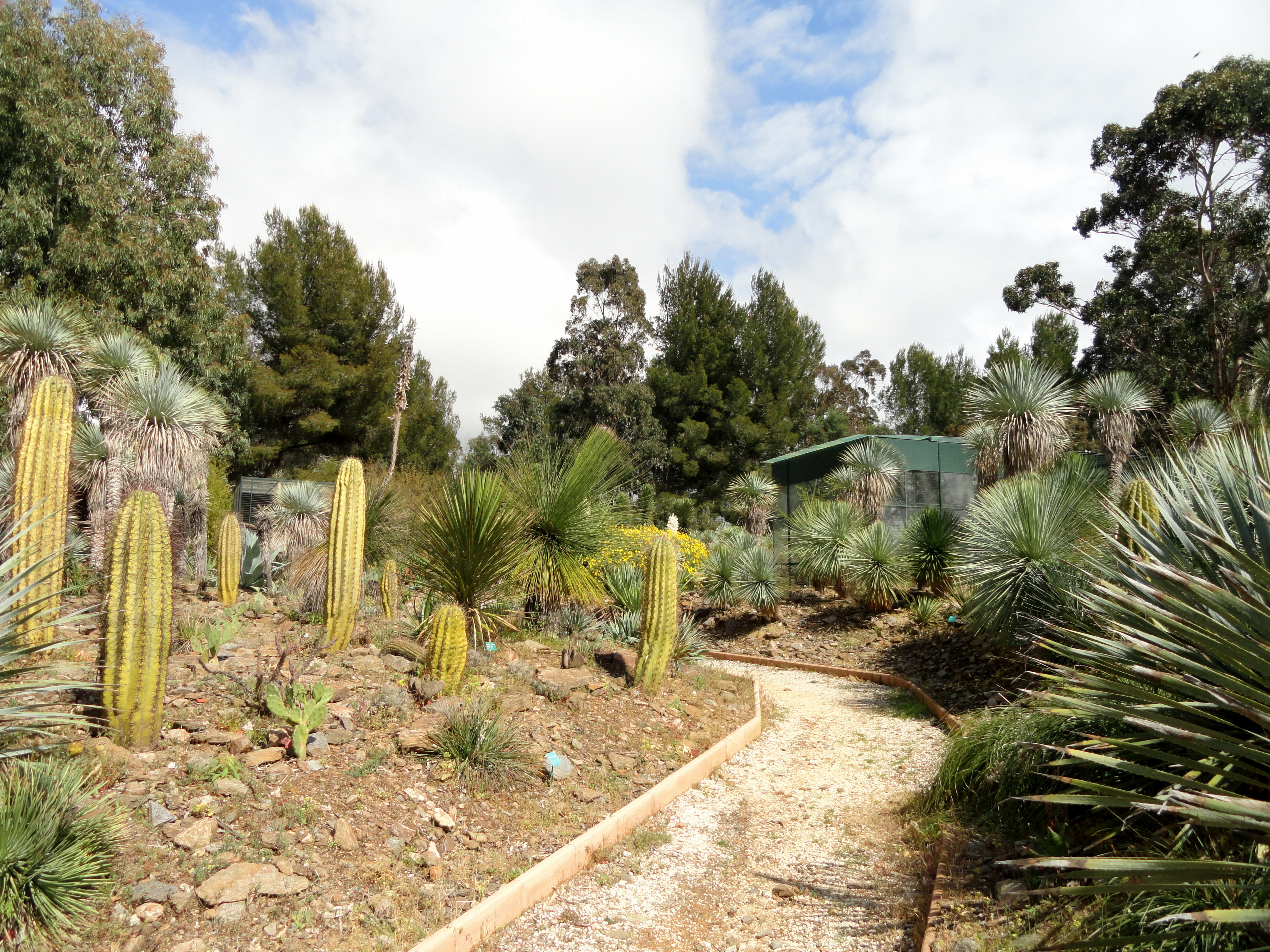 General view of the Jardin d'oiseaux tropicaux, La Londe-les-Maures, France.